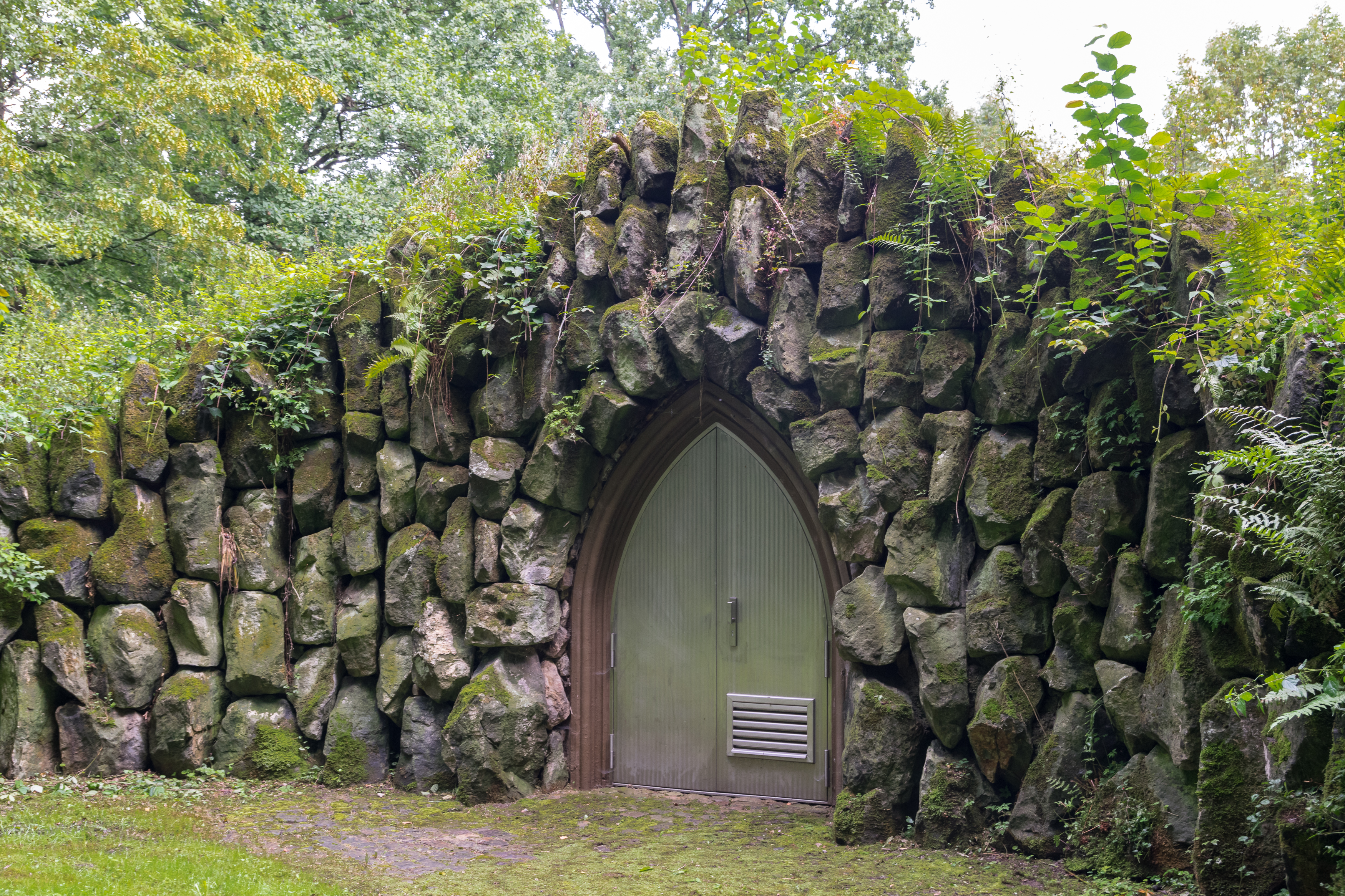 Wasserhochbehälter am Schützenberg, Detmold